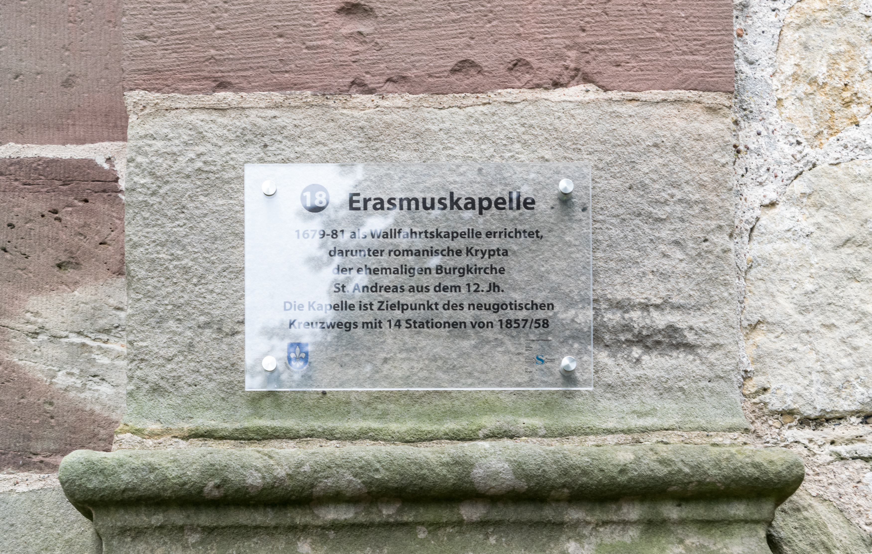 Erasmuskapelle von 1681 auf dem Wartberch in Warburg